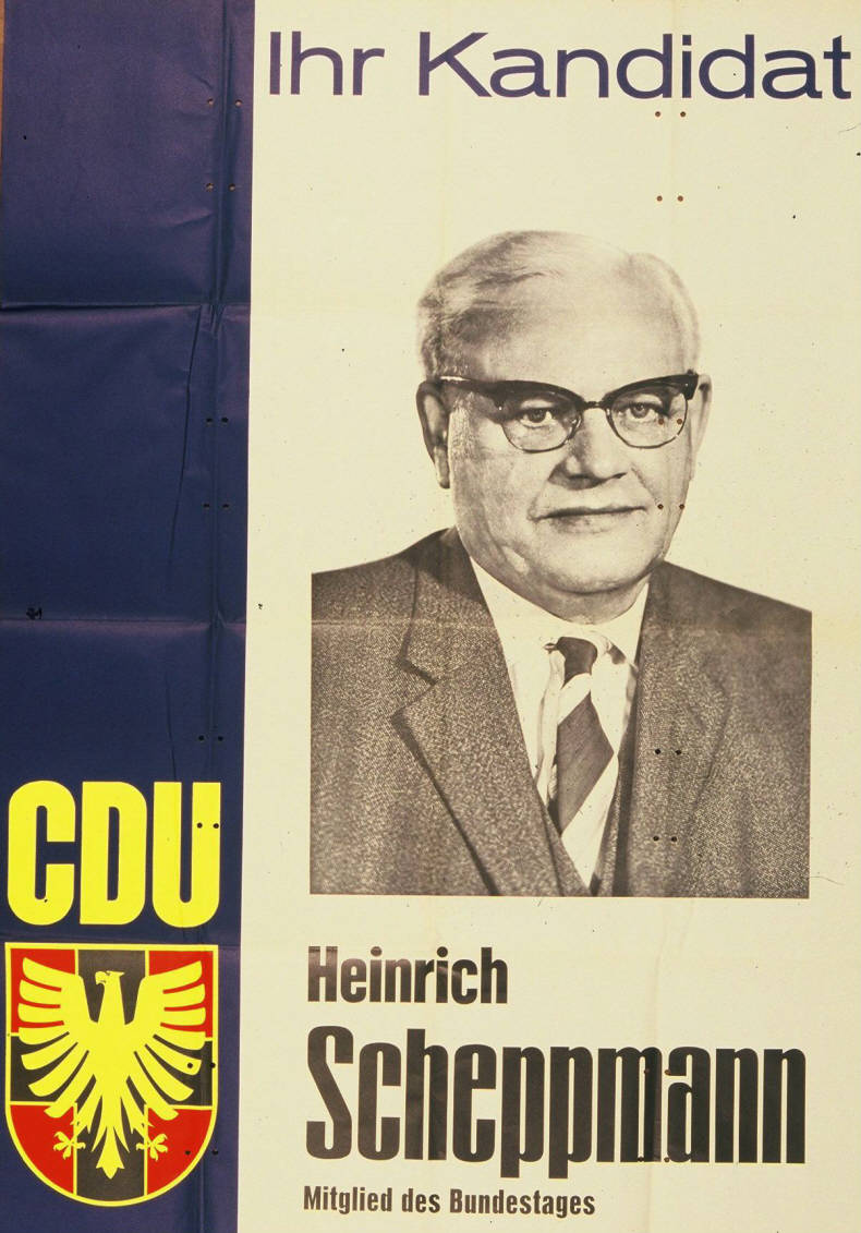 Ihr Kandidat Heinrich Scheppmann Mitglied des Bungestages Abbildung: Porträtfoto Plakatart: Kandidaten-/Personenplakat mit Porträt Auftraggeber: Verantw.: CDU-Bundesgeschäftsstelle Bonn Drucker_Druckart_Druckort: Repro-Druck, Schmiden bei Stuttgart Objekt-Signatur: 10-001: 1043 Bestand: Plakate zu Bundestagswahlen (10-001) GliederungBestand10-18: Plakate zu Bundestagswahlen (10-001) » Die 4. Bundestagswahl am 17. September 1961 » CDU » Mit Porträtfoto Lizenz: KAS/ACDP 10-001: 1043 CC-BY-SA 3.0 DE